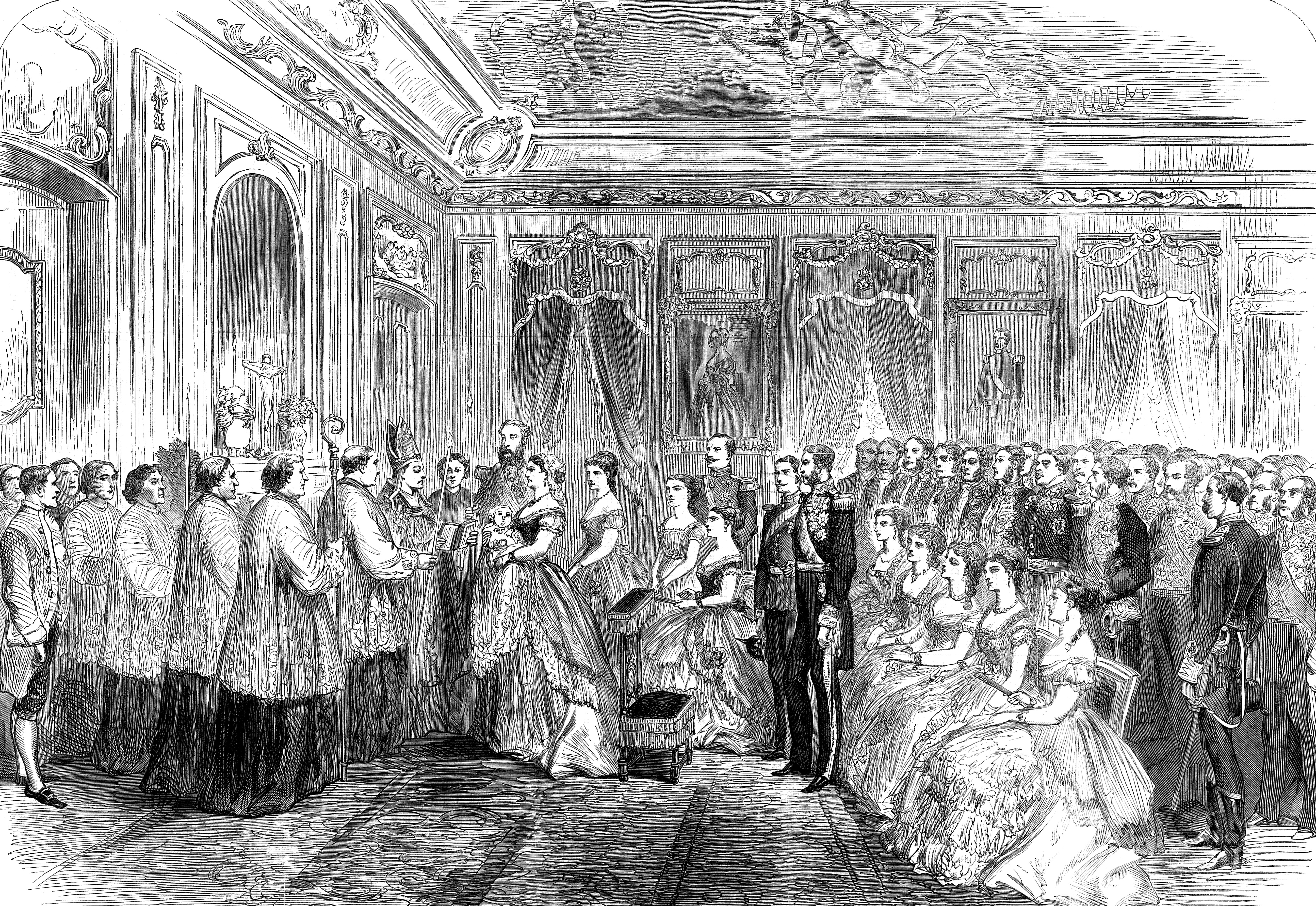 Baptême du prince Baudouin de Belgique, Palais de Flandre (Bruxelles), le 26 juin 1869. — Le baptême du prince Baudouin, le premier enfant du comte et de la comtesse de Flandre, a eu lieu dans le Palais du comte de Flandre, le 26 juin 1869. Les invités sont introduits par le grand maître du palais dans le grand salon du premier étage, disposé pour la cérémonie. En plus de la famille du prince, on retrouve parmi les invités les présidents de la chambre et du sénat, des ministres, des membre du corps diplomatique, le gouverneur de la province et le bourgmestre de Bruxelles, etc. À midi, Mgr Dechamps, archevêque de Malines, assisté de son vicaire général, du doyen de Sainte-Gudule, et du curé de Saint-Jacques-sur-Coudenberg, paroisse royale, protonotaire apostolique, procède au baptême.